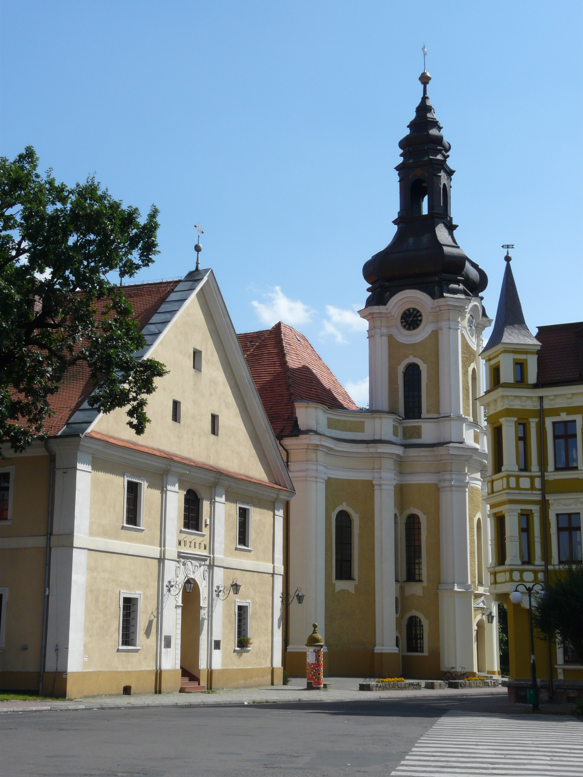 Krotoszyn, klasztor, ob. muzeum, 1733